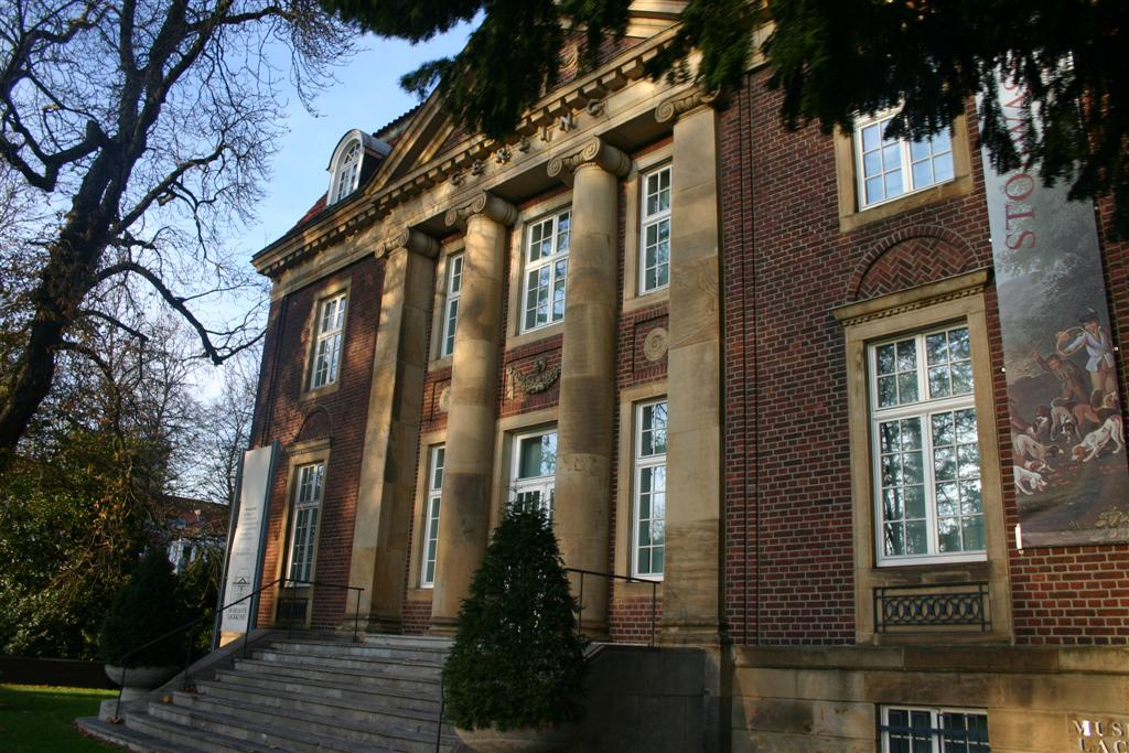 Titel: Museum für Lackkunst Ort: Münster (Westfalen) Aufnahmedatum: 6. November 2005 Fotograf: Andreas Wieland